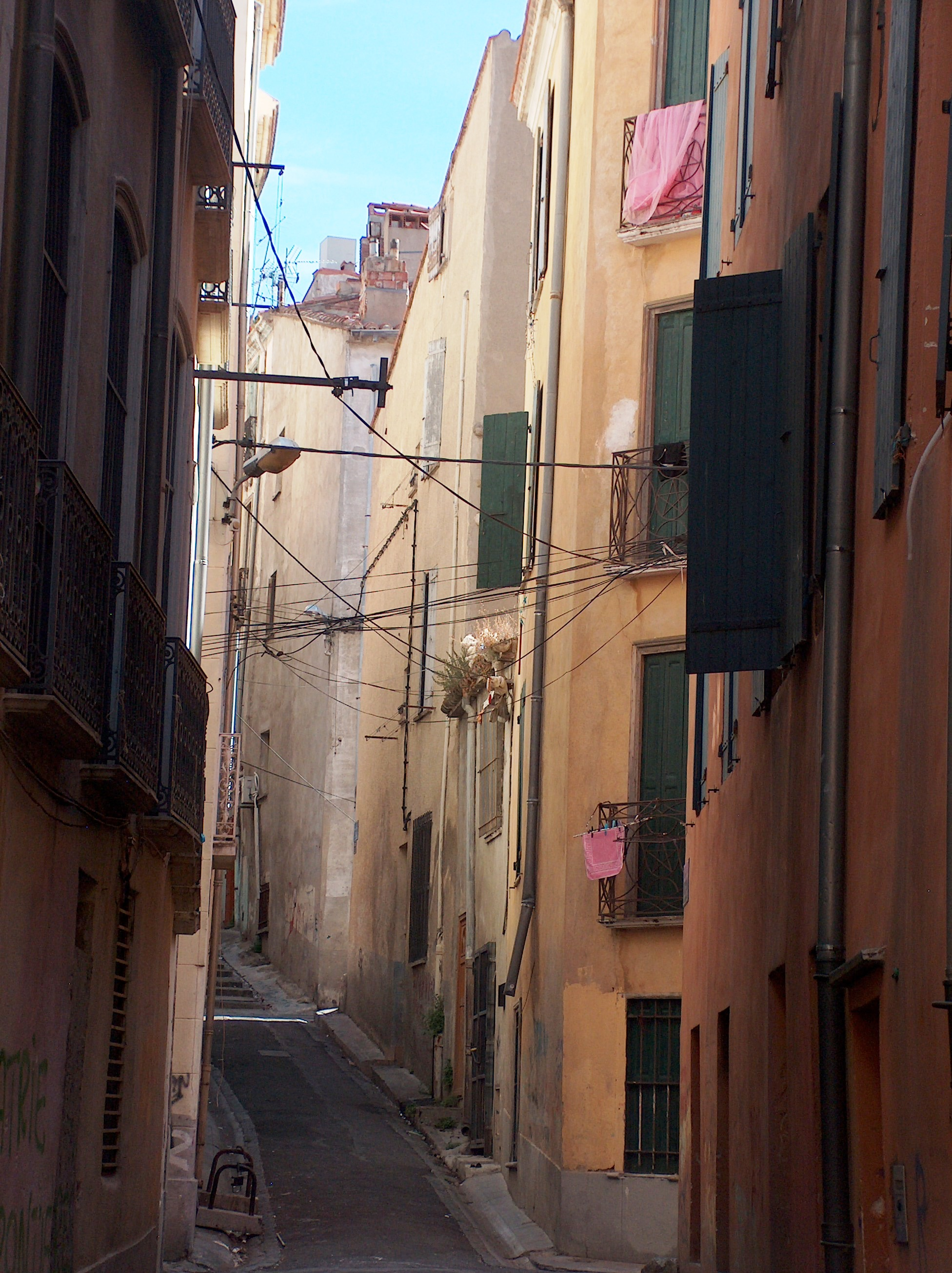 Rue Joseph Bertrand dans le quartier Saint Jacques à perpignan